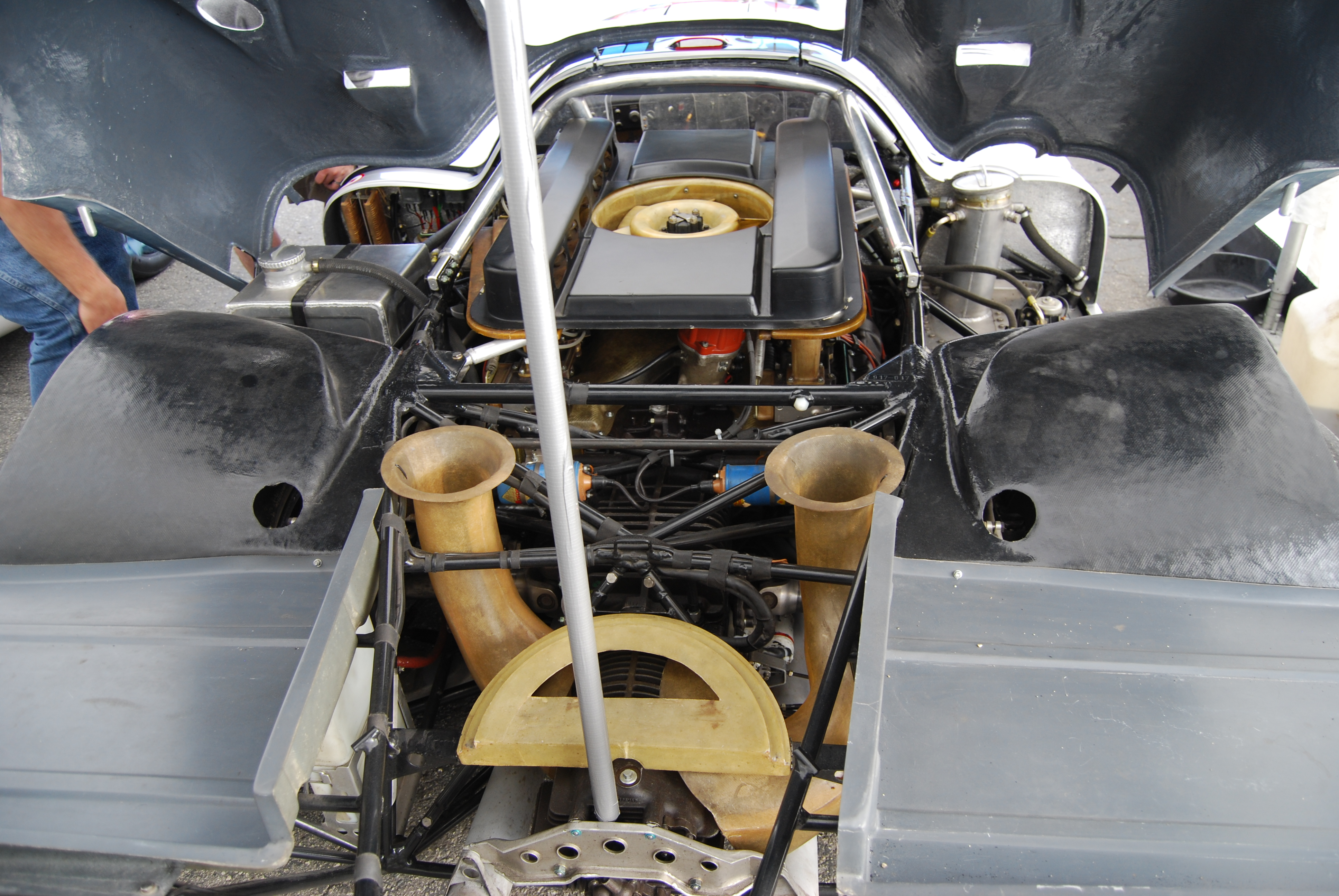 7c11_DSC_0425